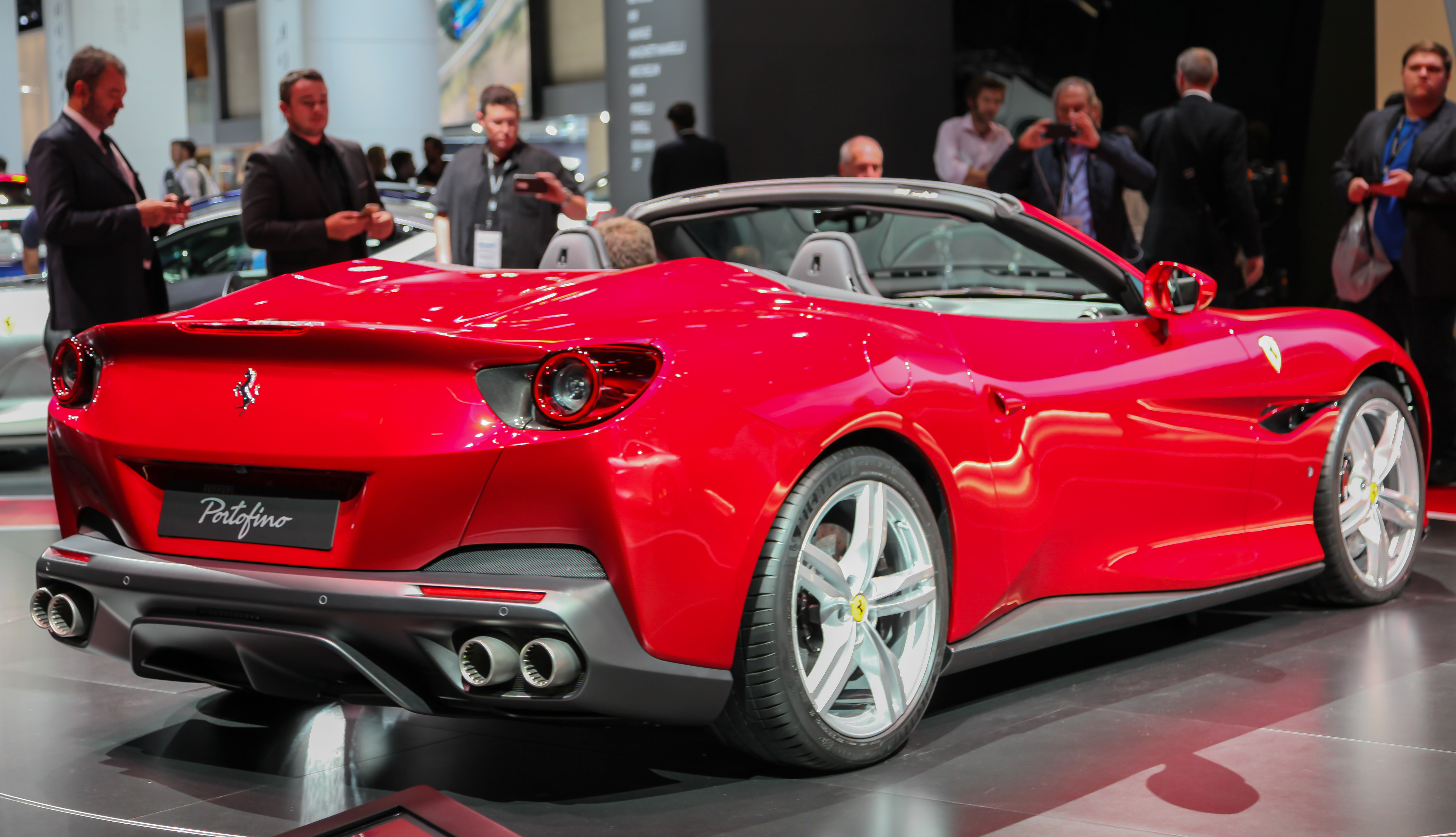 Ferrari Portofino